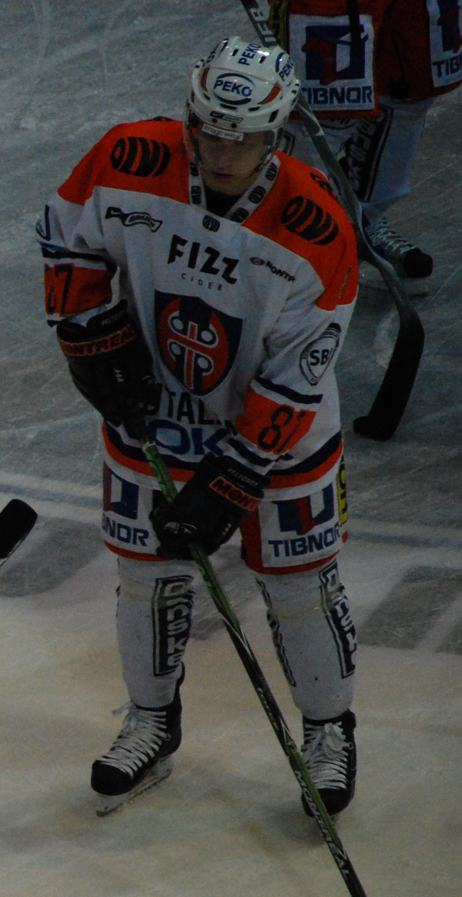 Jukka Peltola